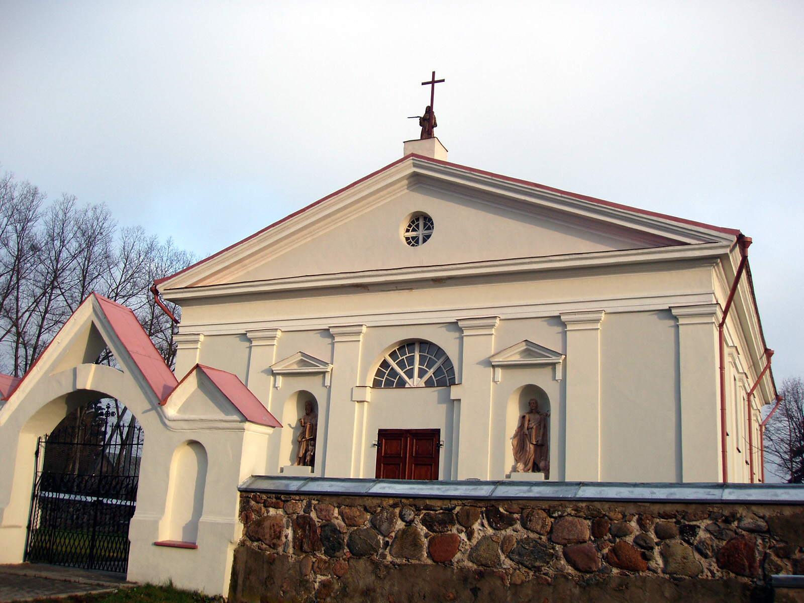 Čiobiškis, Lithuania